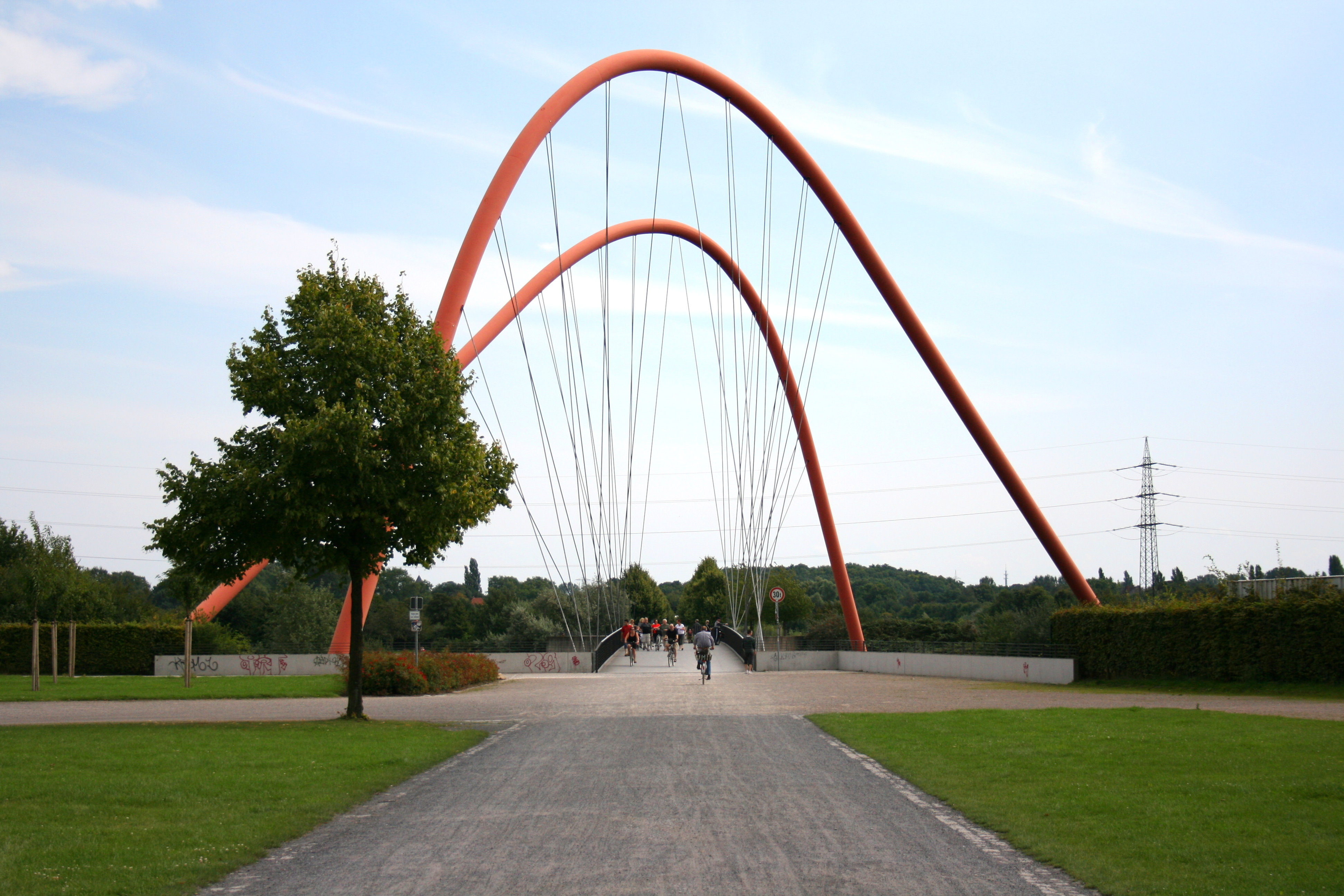 Brücke über den Rhein-Herne-Kanal im Nordsternpark in Gelsenkirchen